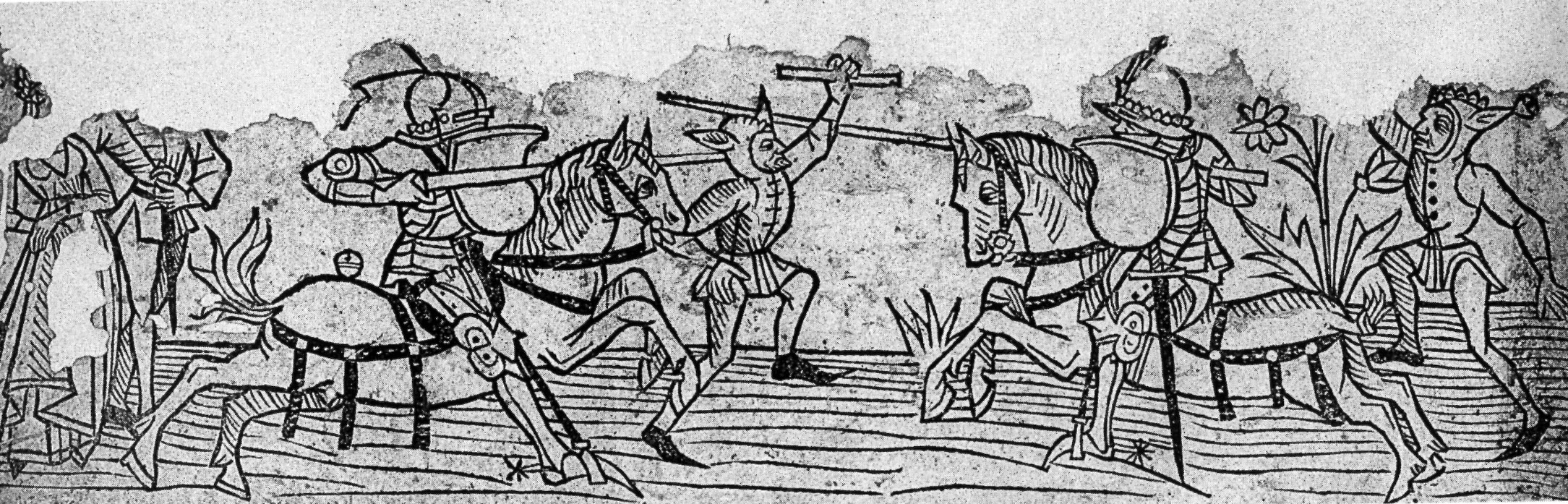 Turnierszene aus einem Basler Kalenderblatt, um 1480. In der Bildmitte tjostieren zwei Ritter, links ein vornehmes Liebespaar. Die zwei Personen in Narrenkostümen mit angedeuteter Eselsmaskierung sind Herolde, die als Schiedsrichter über den Ausgang des Wettkampfs wachen.